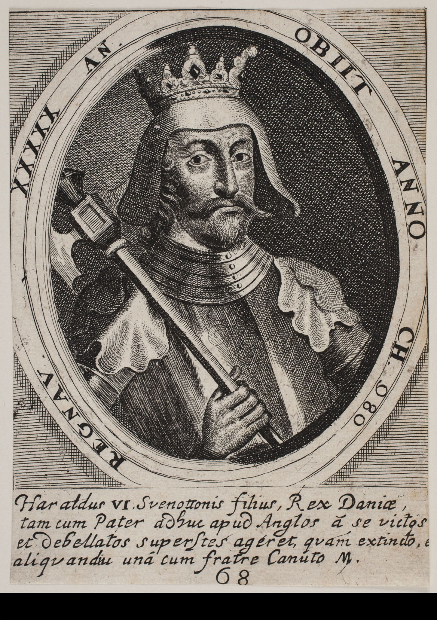 Kobberstik af Albert Haelwegh fra 1646 forestillende den danske konge Harald 2. (Svend Tveskægs søn), der regerede 1014-1018. Denne Haralds placering i Albert Haelwegh rækkefølge af portrætter af de danske konger er ganske korrekt, derimod refererer regentnummeret (Haraldus VI), som Haelwegh benytter, til en række tidligere sagnkonger ved navn Harald, som i moderne tid normalt ikke medtages i nummereringen af danske konger med navnet Harald. Det angivne dødsår og den angivne regentlængde er også en del eller meget ved siden af på dette kobberstik i forhold til det faktisk accepterede vedrørende Harald II.